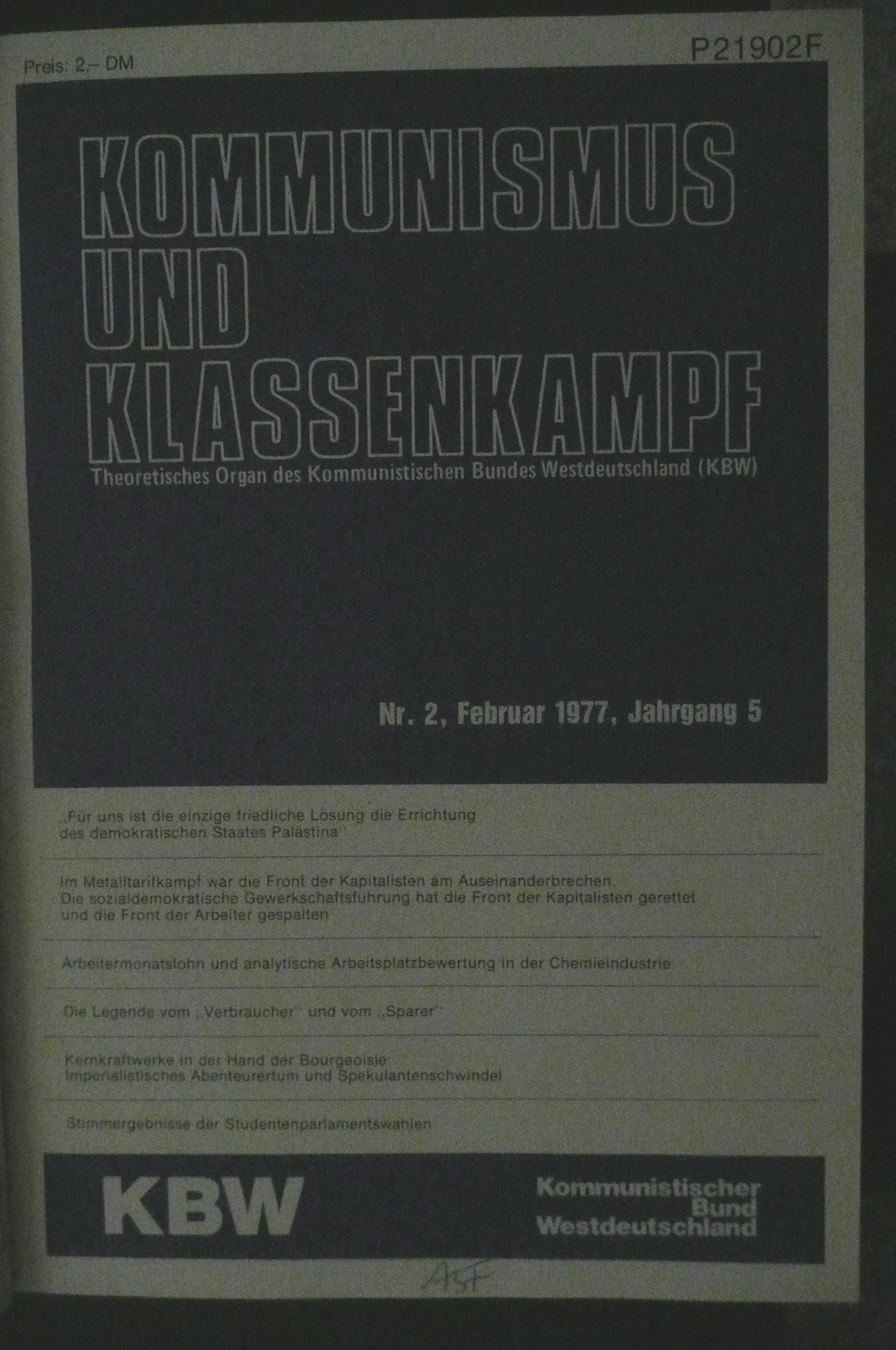 Kommunismus und Klassenkampf, Februar 1977, eigene Aufnahme